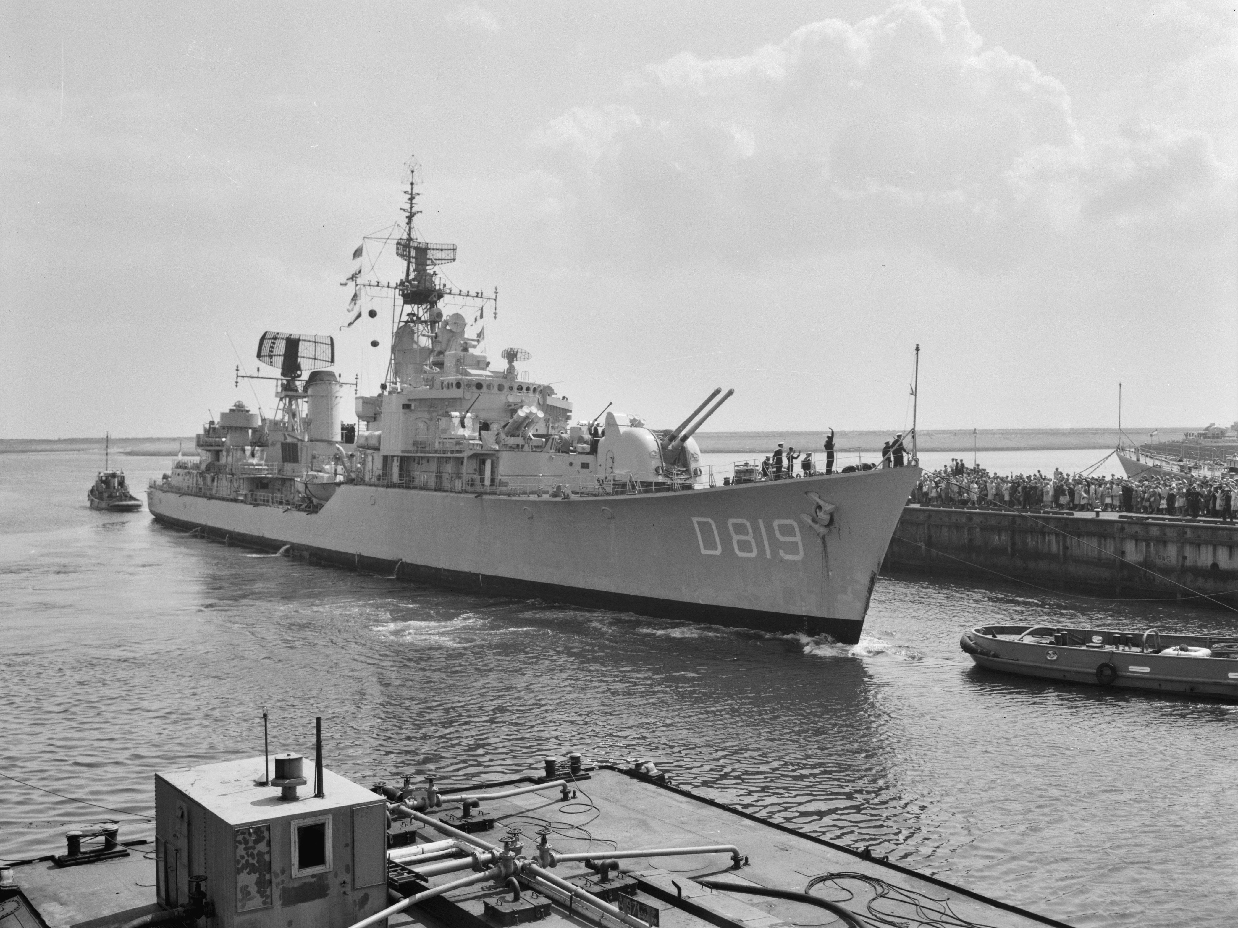 Collectie / Archief : Fotocollectie Anefo Reportage / Serie : [ onbekend ] Beschrijving : Aankomst Hr. Ms. Fregat Piet Hein . Hr. Ms. jager Amsterdam Datum : 10 juni 1961 Trefwoorden : SCHEPEN, aankomsten Persoonsnaam : Hr. Ms. Fregat Piet Hein, Hr. Ms. jager Amsterdam Fotograaf : Bilsen, Joop van / Anefo Auteursrechthebbende : Nationaal Archief Materiaalsoort : Negatief (zwart/wit) Nummer archiefinventaris : bekijk toegang 2.24.01.04 Bestanddeelnummer : 912-5862